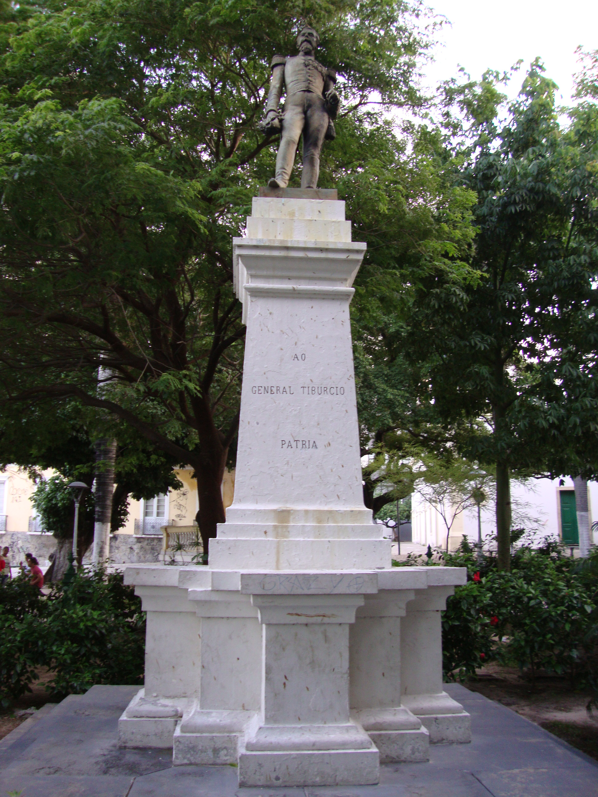 Português do Brasil: Estátua do General Tibúrcio na Praça dos Leões, em Fortaleza, Ceará, Brasil.